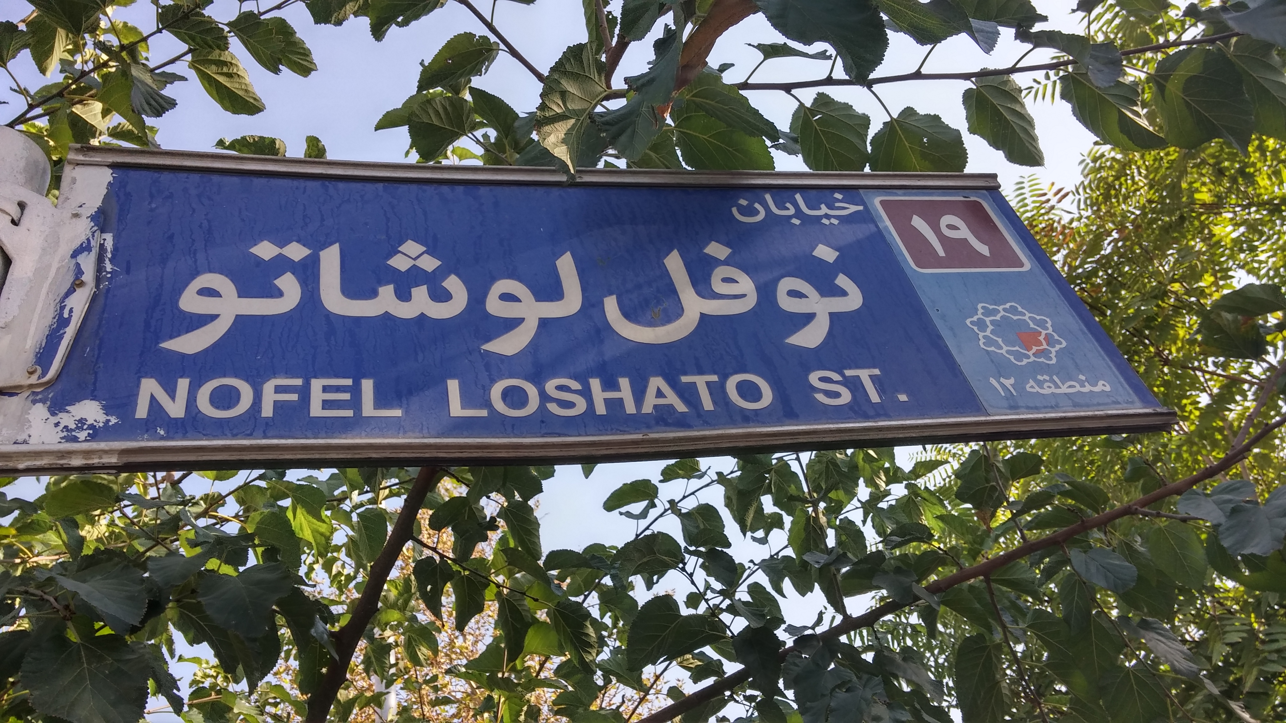 Panneau de la rue Neauphle-le-Château à Téhéran